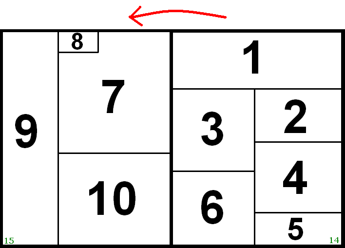 sumar prawidłowy sposób czytania oryginalnej mangi